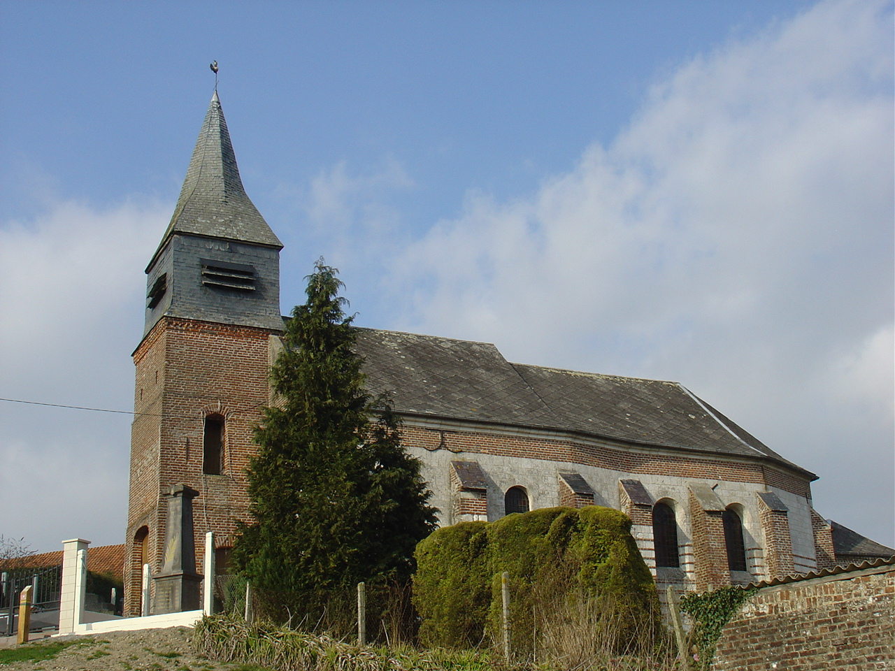 Église de Haravesnes